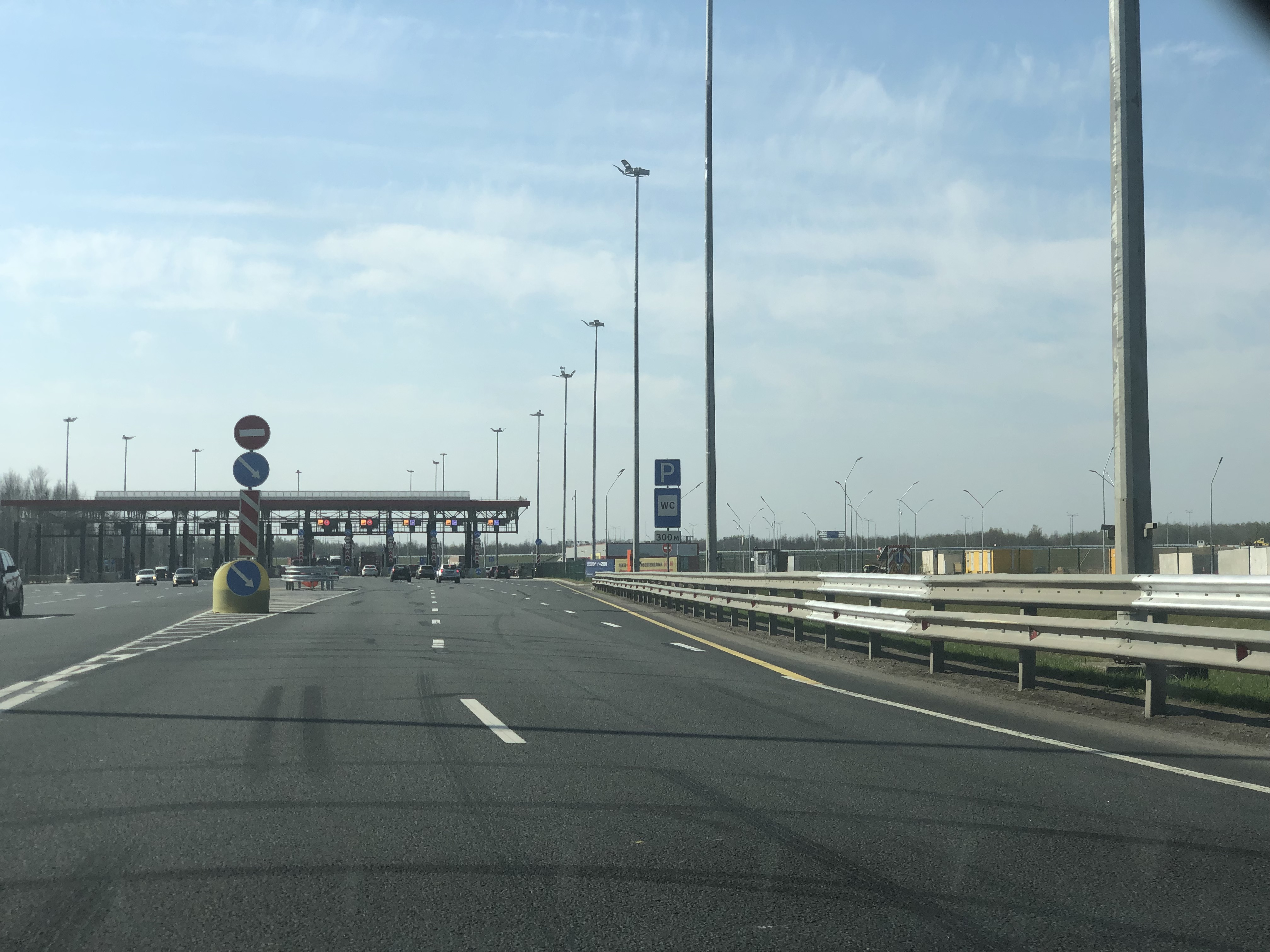 Развязка М10 и М11. Мясной бор.